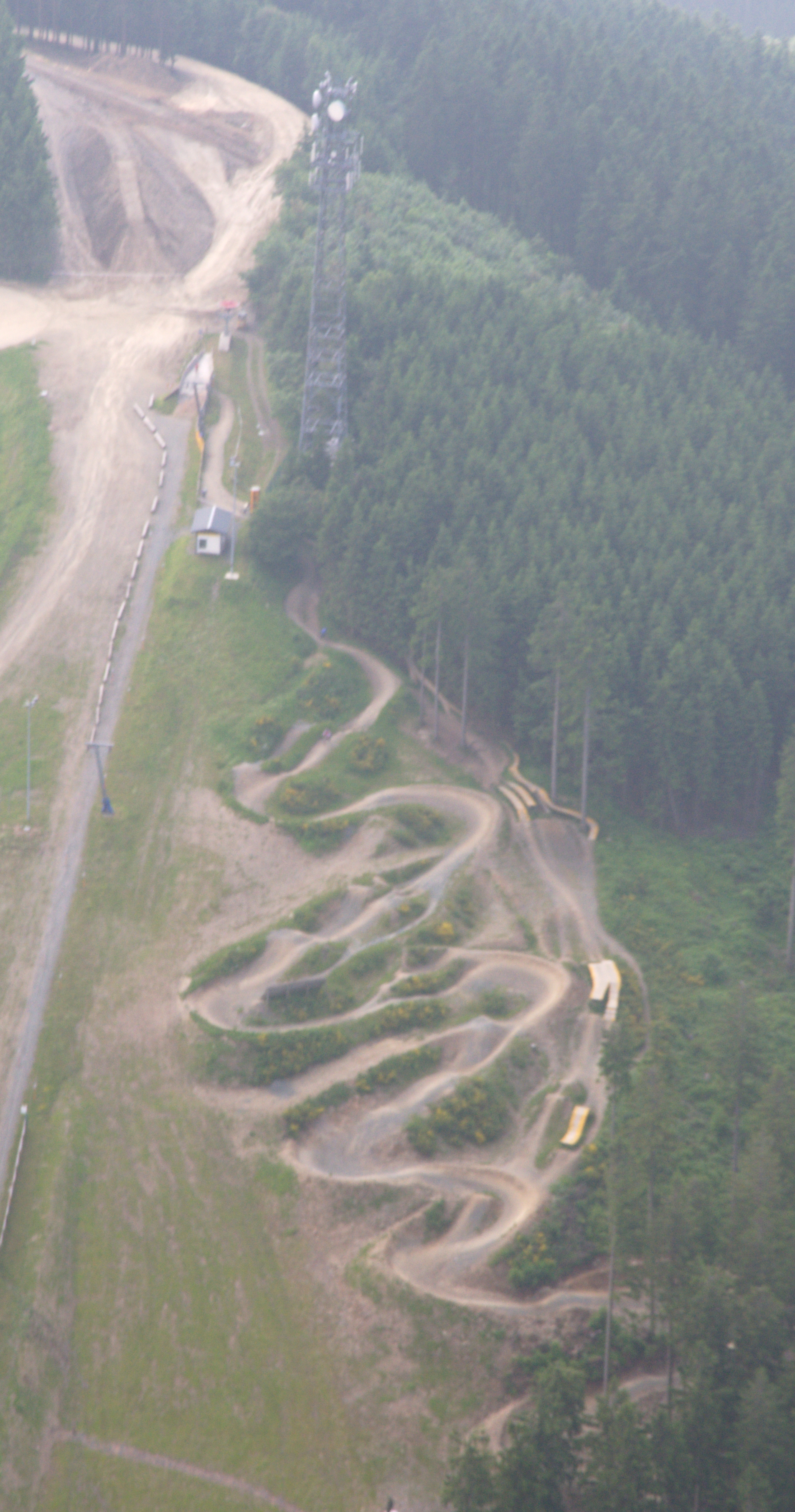 Fotoflug Sauerland-Ost: Berg Kappe in Winterberg; Bike-Park.